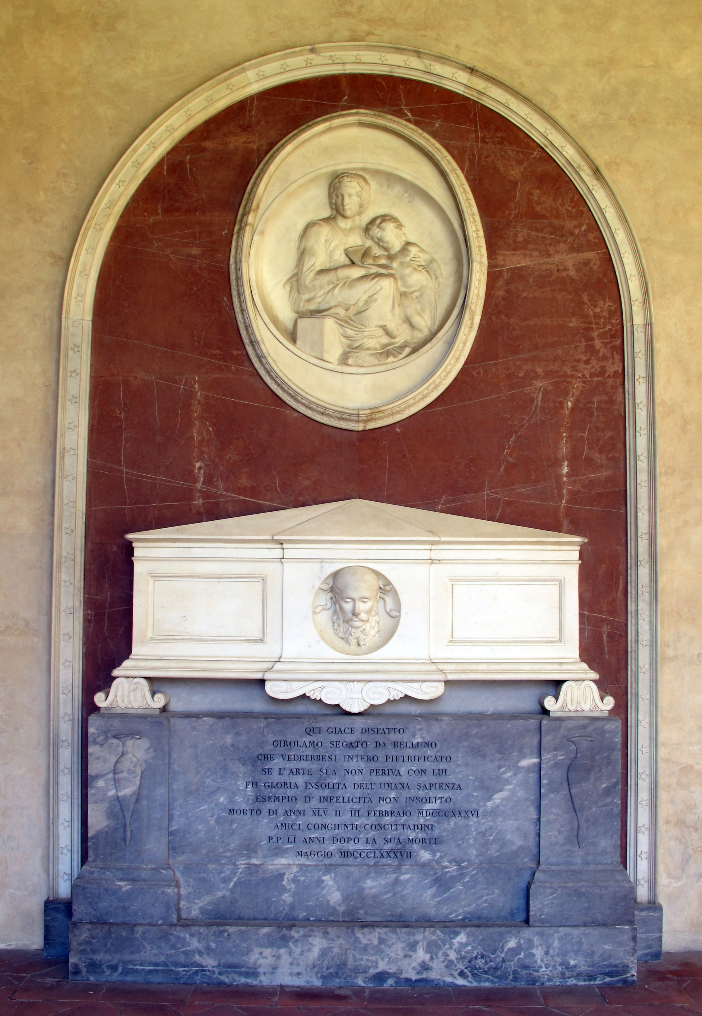 Chiostro Grande della Basilica of Santa Croce (Firenze). Monumento a girolamo segato da belluno, della scuola di Lorenzo Bartolini.